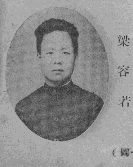 中文（台灣）: 《民國名人圖鑑》肖像